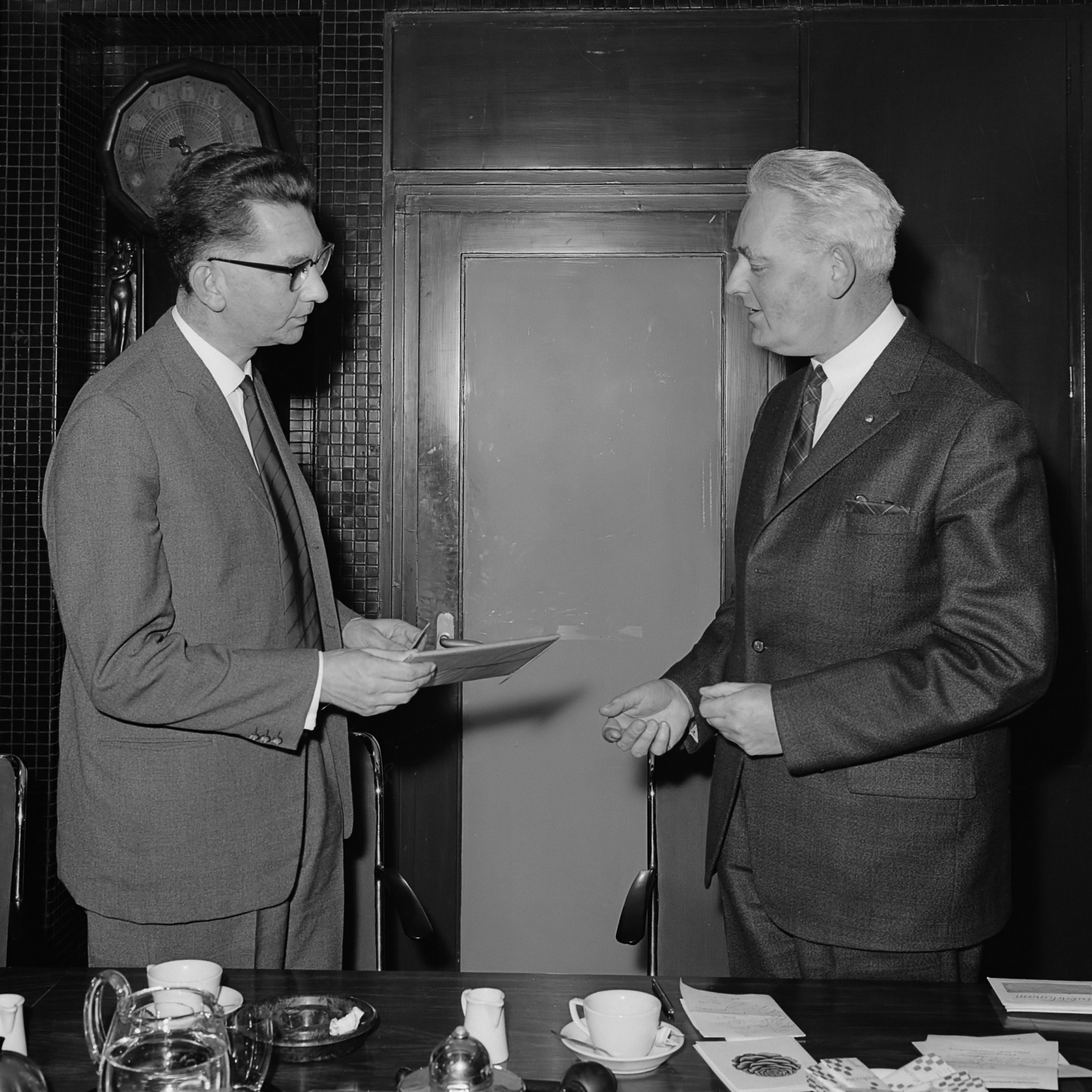 Roland Holstprijs 1963 uitgereikt aan dr. Fokke Sierksma (links) en rechts professor Garm Stuyveling 19 december 1963